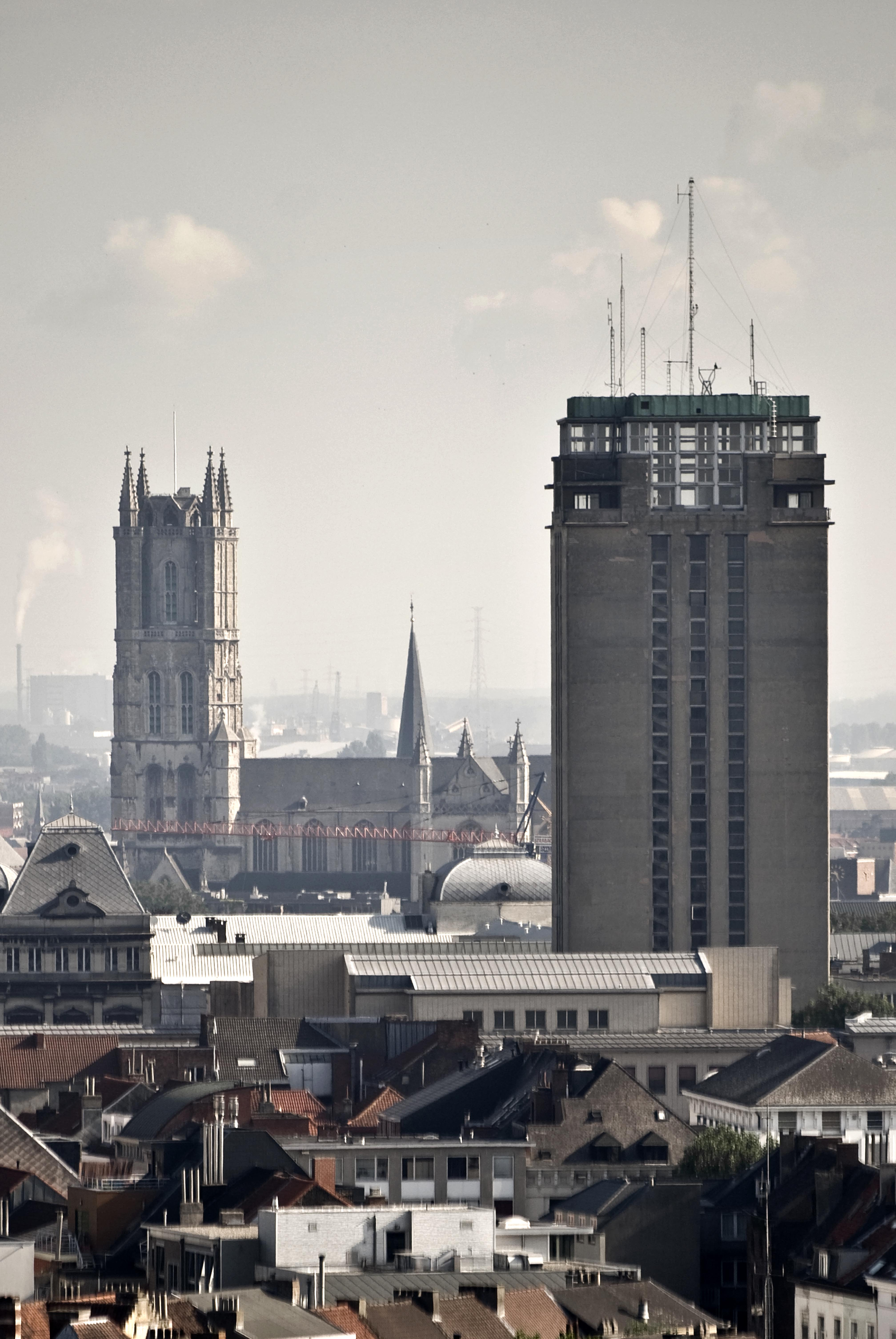 Ugent, de Boekentoren met op de achtergrond de stad en de Sint-Baafskathedraal.